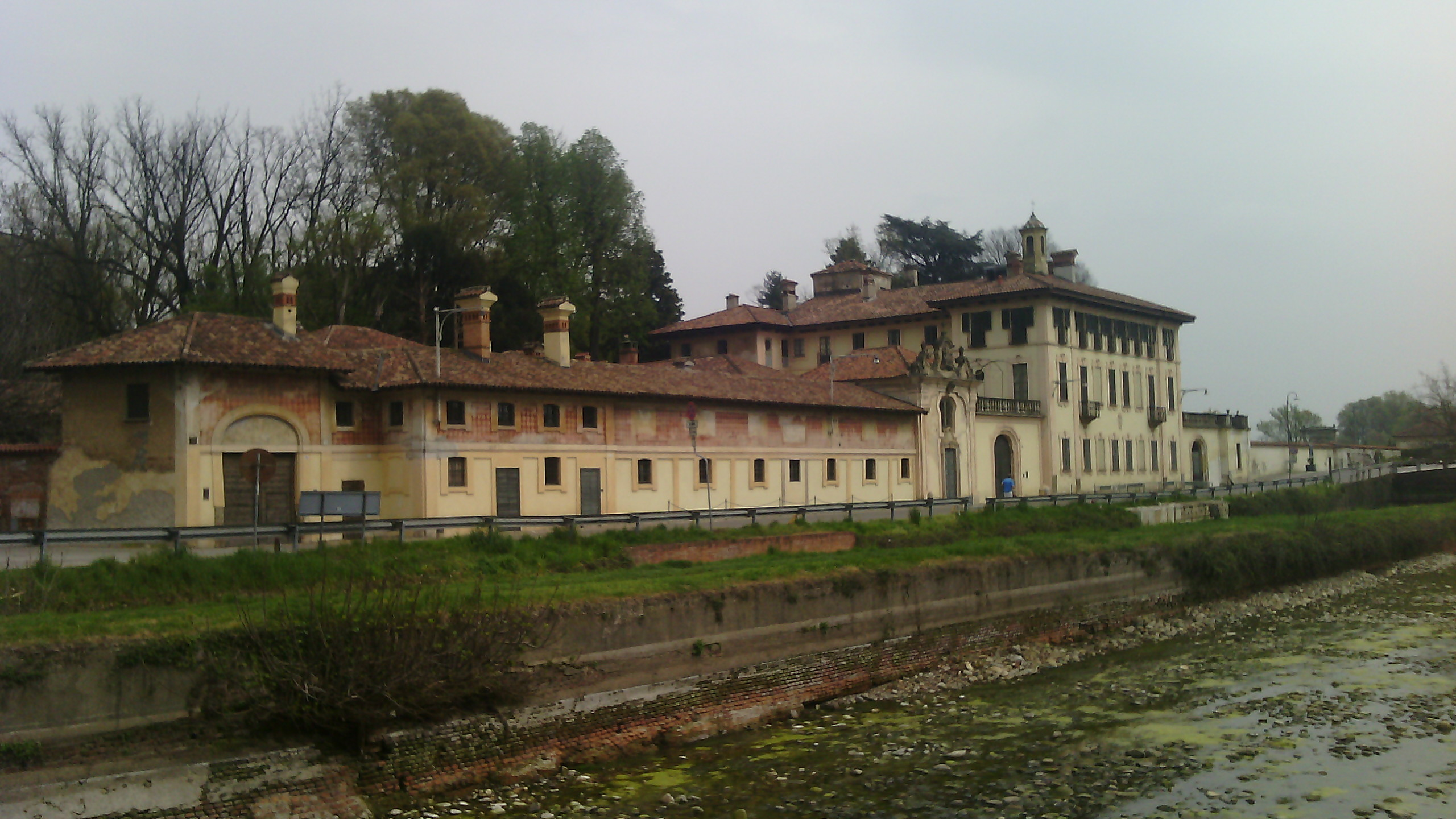 Villa Visconti Maineri a Cassinetta di Lugagnano (MI) - veduta d'insieme